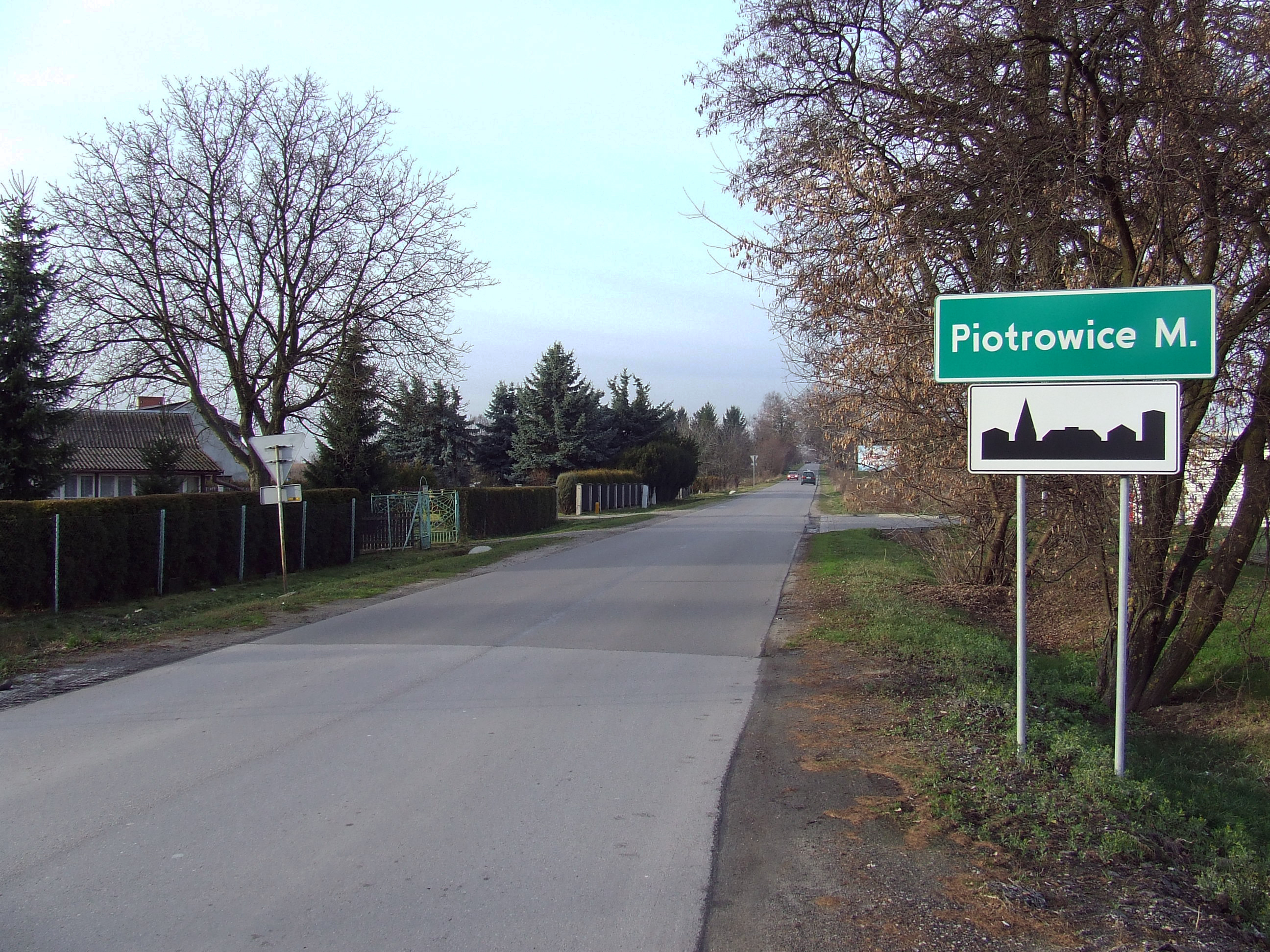 Piotrowice Małe w gminie Nałęczów